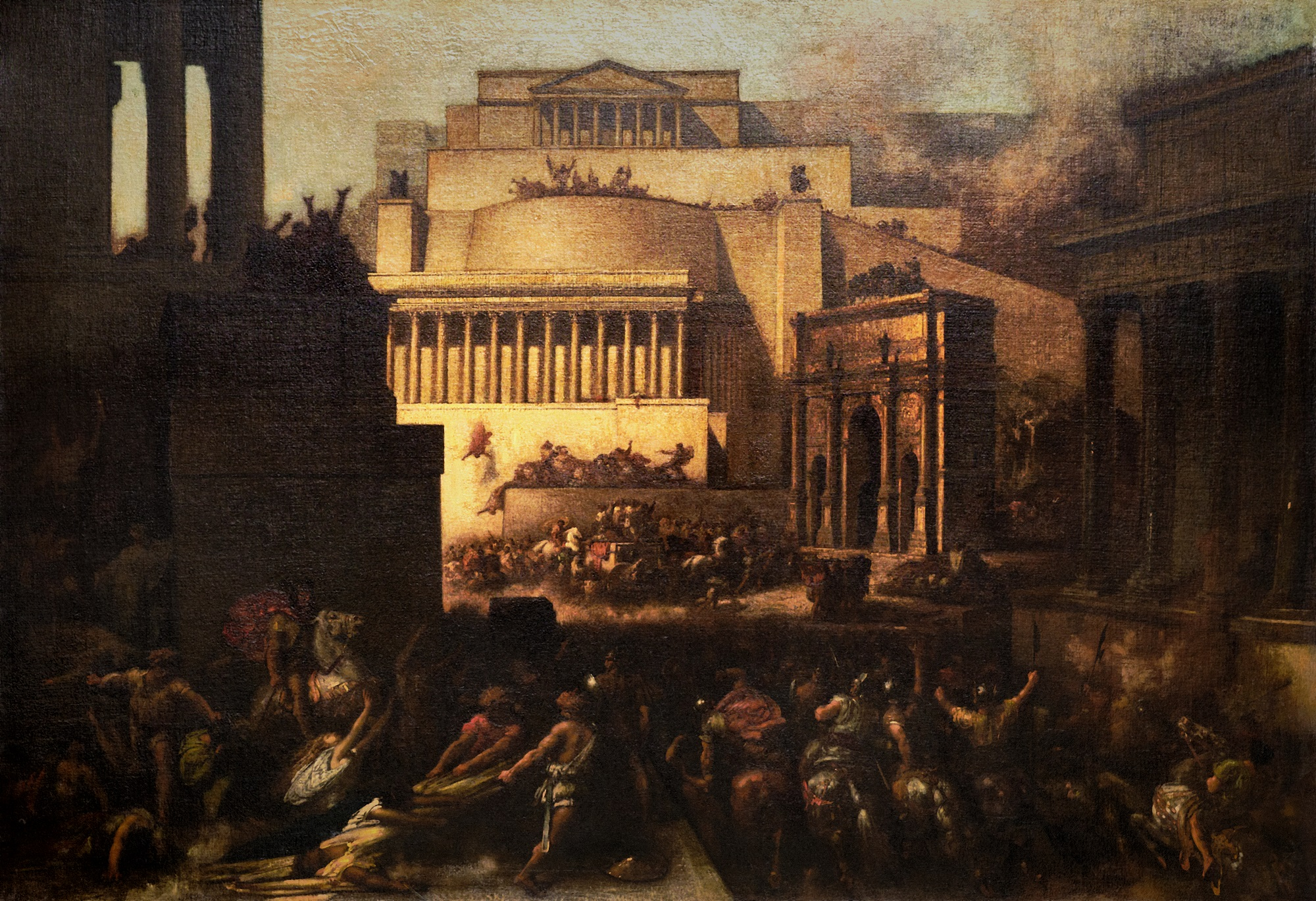 Huile sur toile - 80 x 115 cm Saint-Omer, Musée de l’hôtel Sandelin Photo : 8KStories